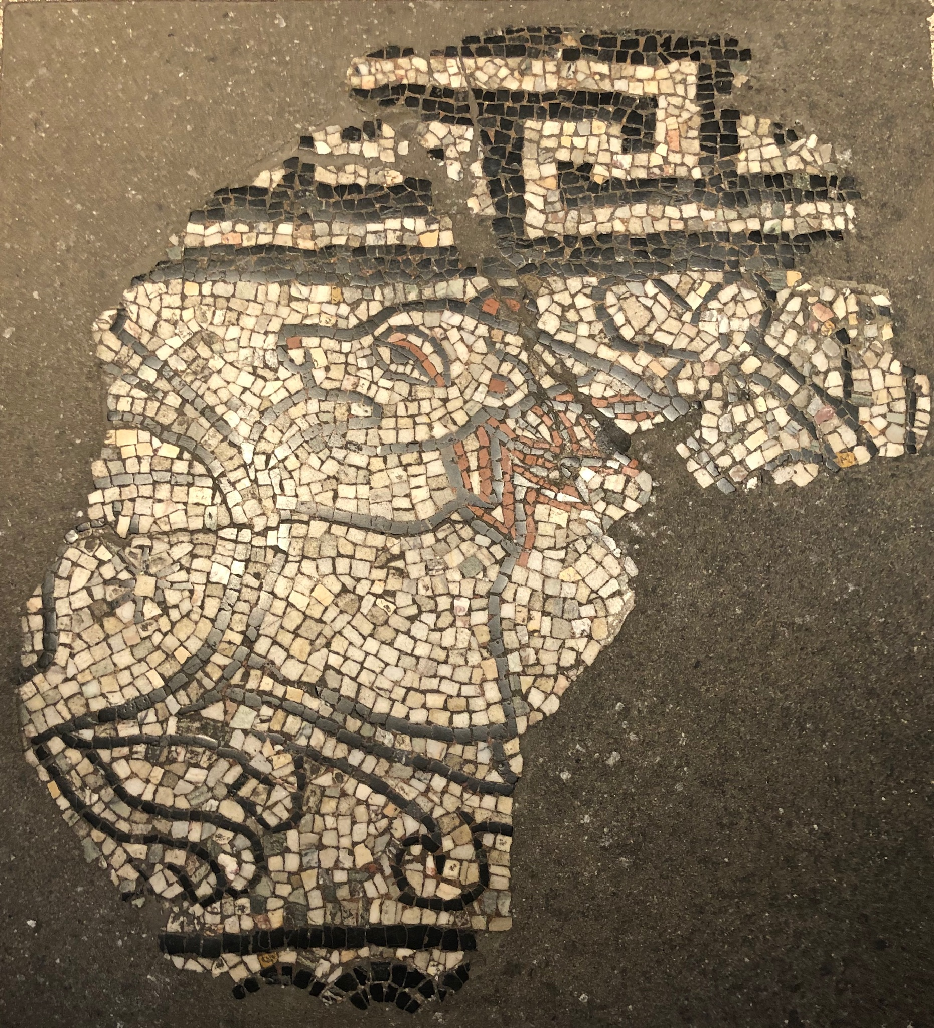 Löwenmosaik aus dem 13. Jahrhundert in Groß St. Martin in Köln